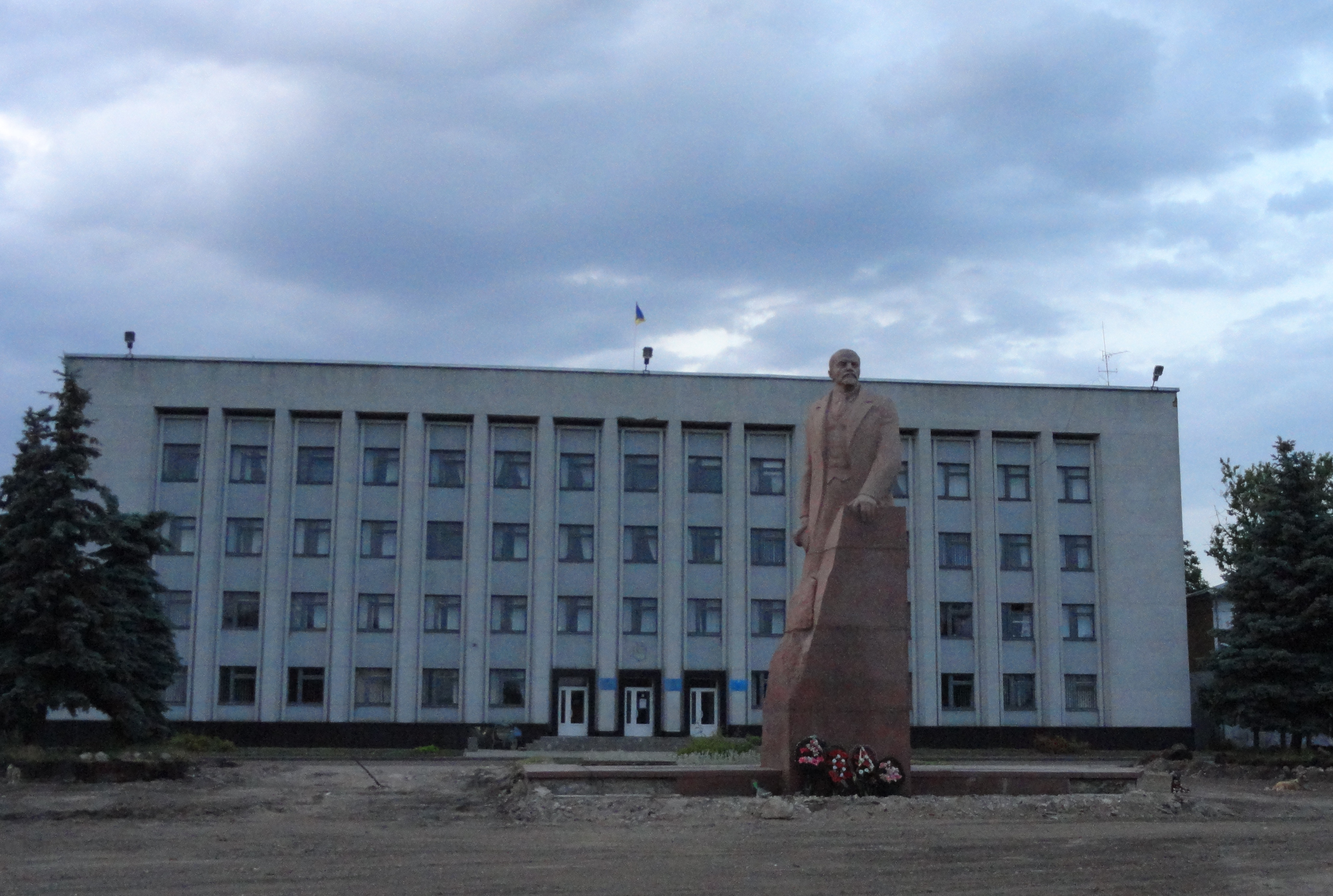 Пл. Жовтнева, 1. Встановлено пам’ятник Володимиру Іллічу Леніну. Автори пам’ятника: скульптор М.Васильченко, архітектори П. Бірюк, П. Перевозник. Роботи по спорудженню пам’ятника виконали Бердичівське ремонтно-будівельне управління, Київські міжобласні спеціальні науково-реставраційні виробничі майстерні та Київське творчо-виробниче об'єднання "Художник" художнього фонду УРСР. Пам'ятник виготовлено з рожевого граніту Ємельянівського родовища Житомирської області. Загальна висота пам’ятника 8,7 м. Висота скульптури 4,0 м., розмір постаменту 2 х 2 х 4,7 м. Був демонтований під час подій зими 2014.